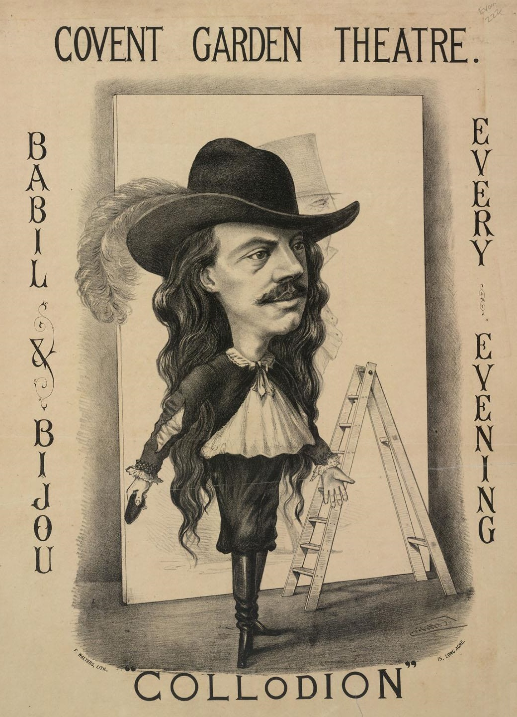 Affiche pour le numéro de Victor Collodion et la féérie Babil & Bijou au Covent Garden Theater (fin 1872 ou début 1873).